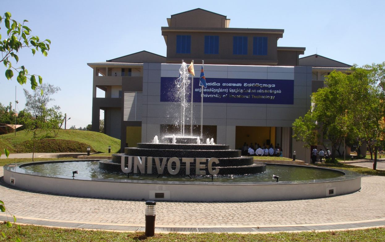 සිංහල: වෘත්තිය තාක්ෂණ විශ්වවිද්‍යාලය